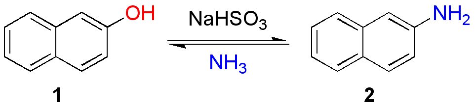 Bucherer-reactie, algemeen (eigen creatie)